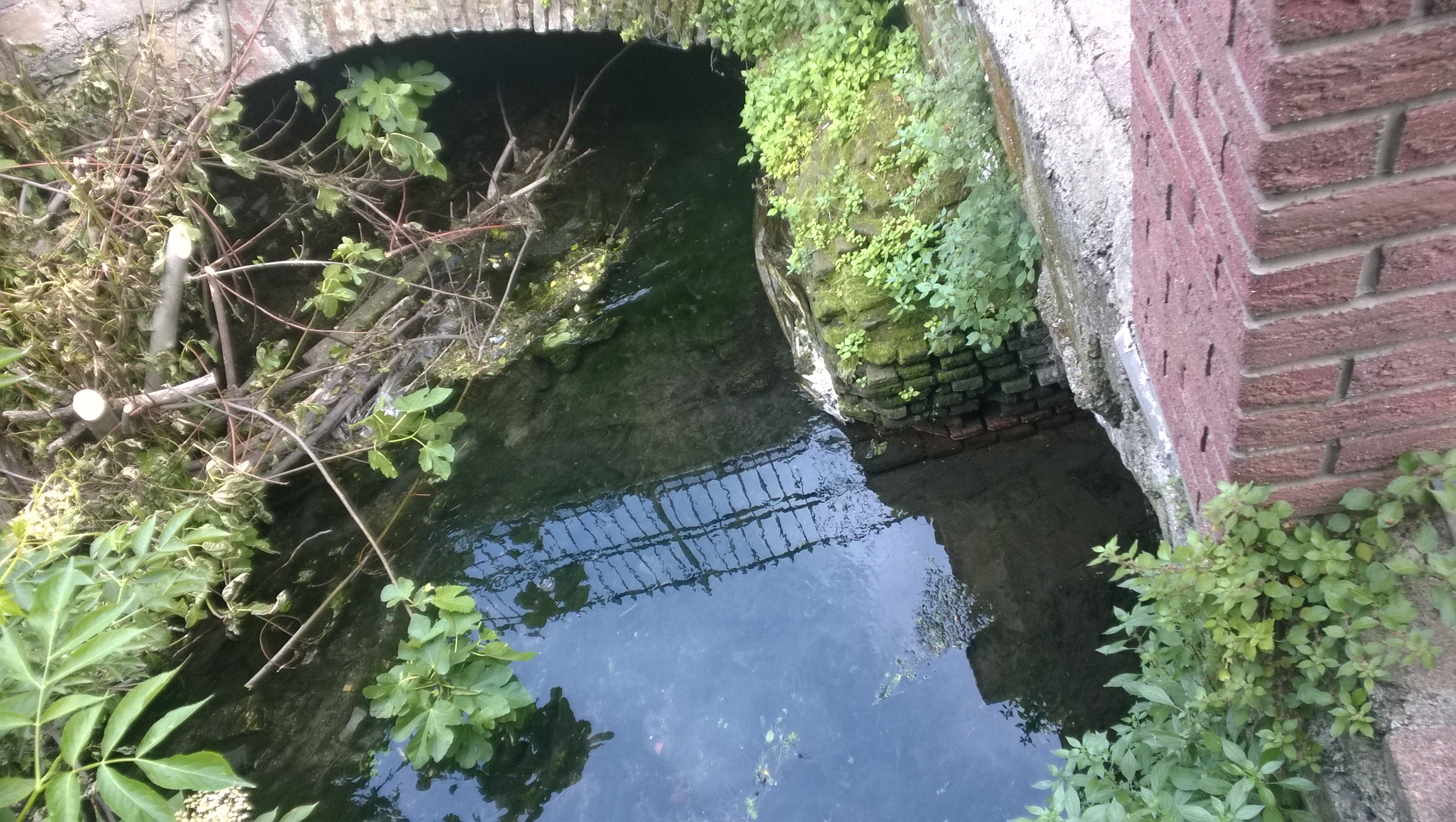 Biforcazione della Vettabbia poco dopo via Ripamonti (Milano). Il ramo di destra va ad alimentare il mulino Vettabbia Destra (XVII secolo).